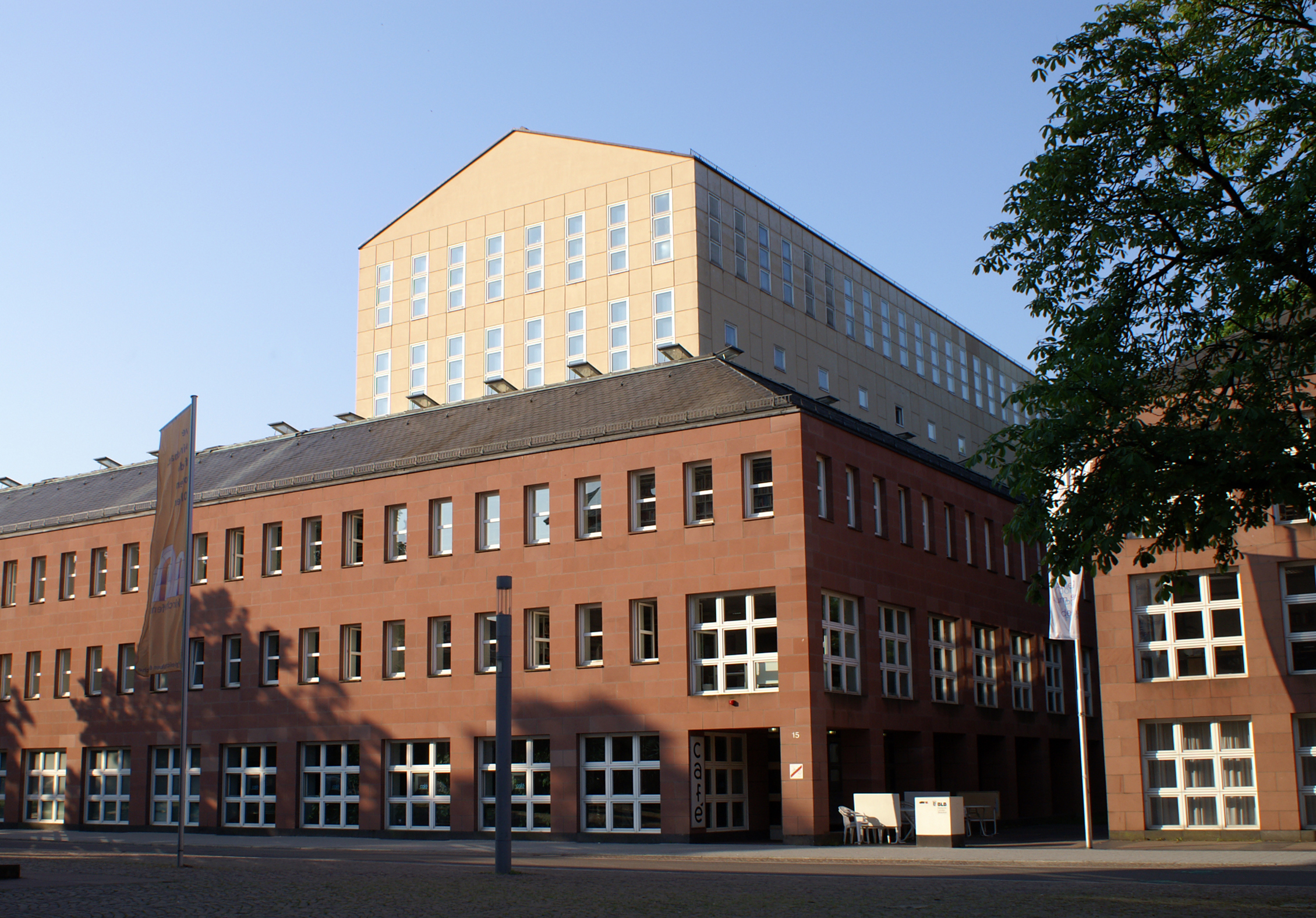 Fassade der Badischen Landesbibliothek